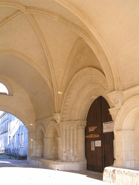 Hopital des pelerins de Pons